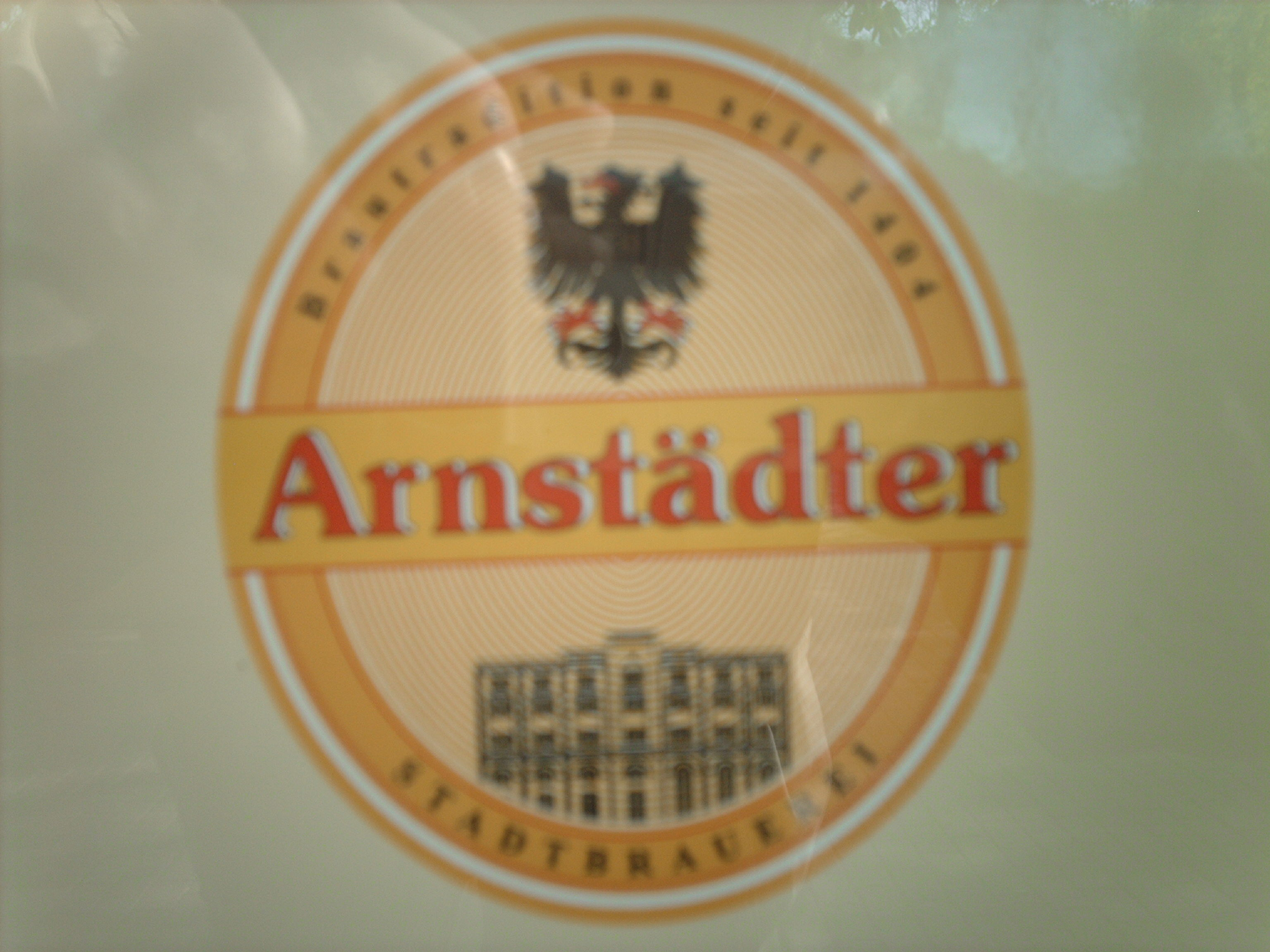 Logo der Stadtbrauerei Arnstadt.